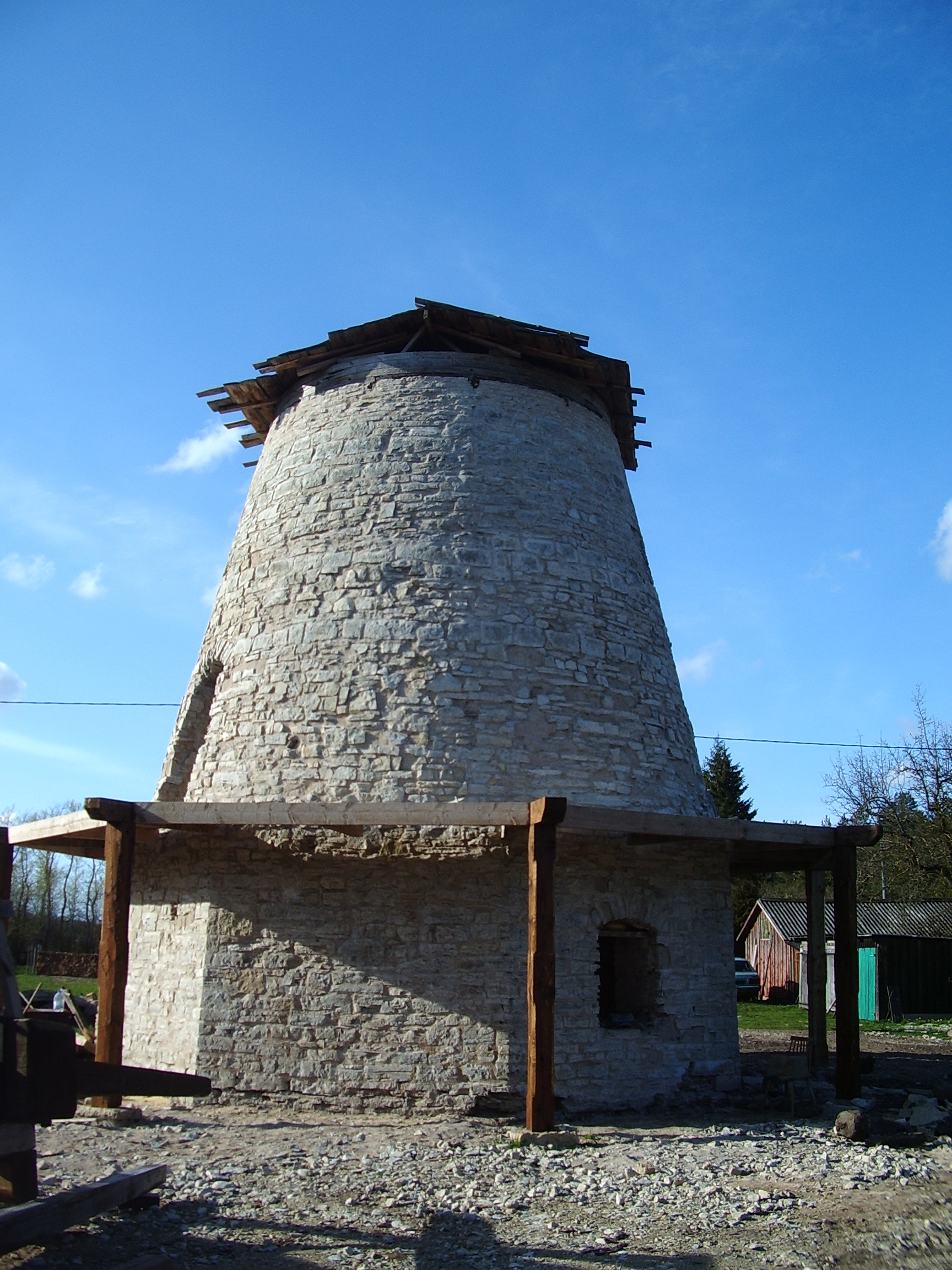 1901. aastal ehitatud hollandi tuuliku restaureerimine 2007. aasta mais